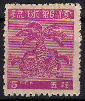 沖縄で1948年に発行された5銭普通切手